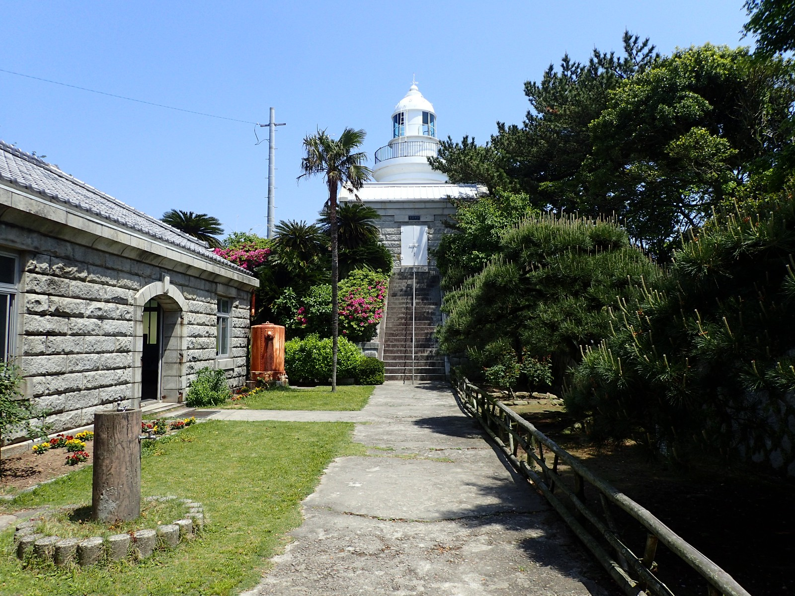 姫島の姫島灯台